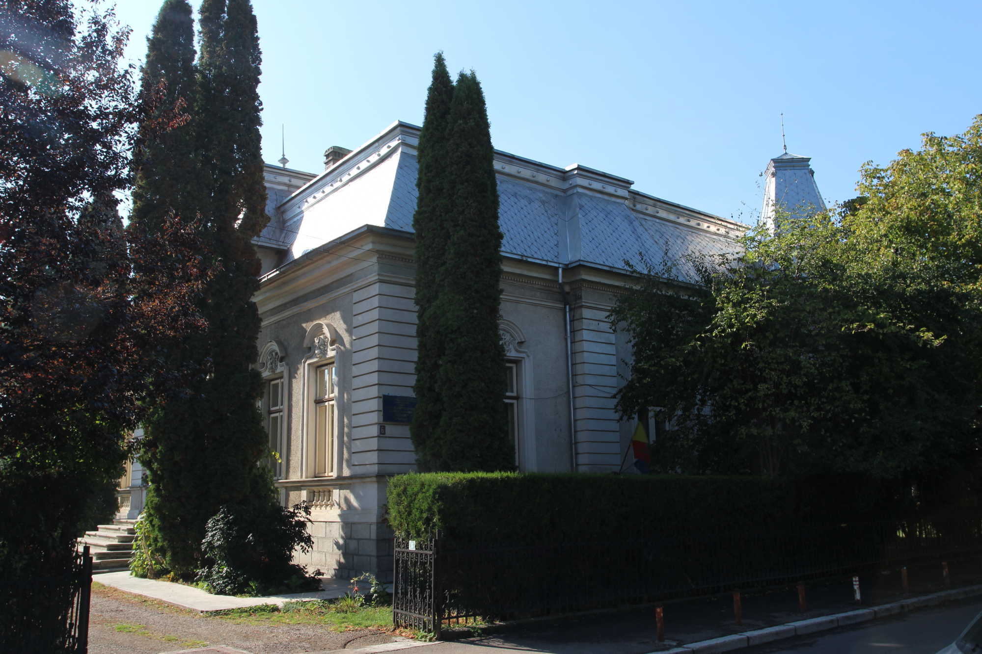 Casă, azi Centrul de cercetări biologice și geologice